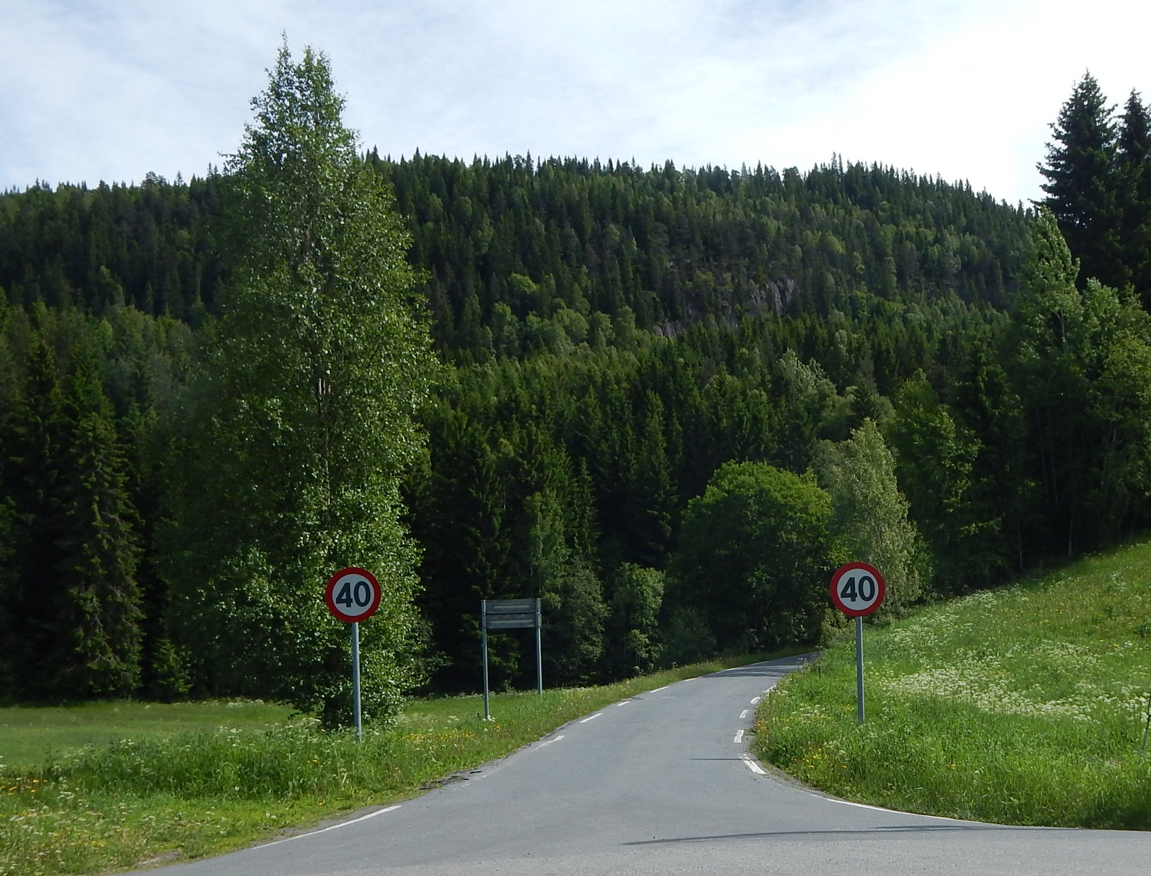 Bjørgesetervegen sett fra Hadelandsvegen